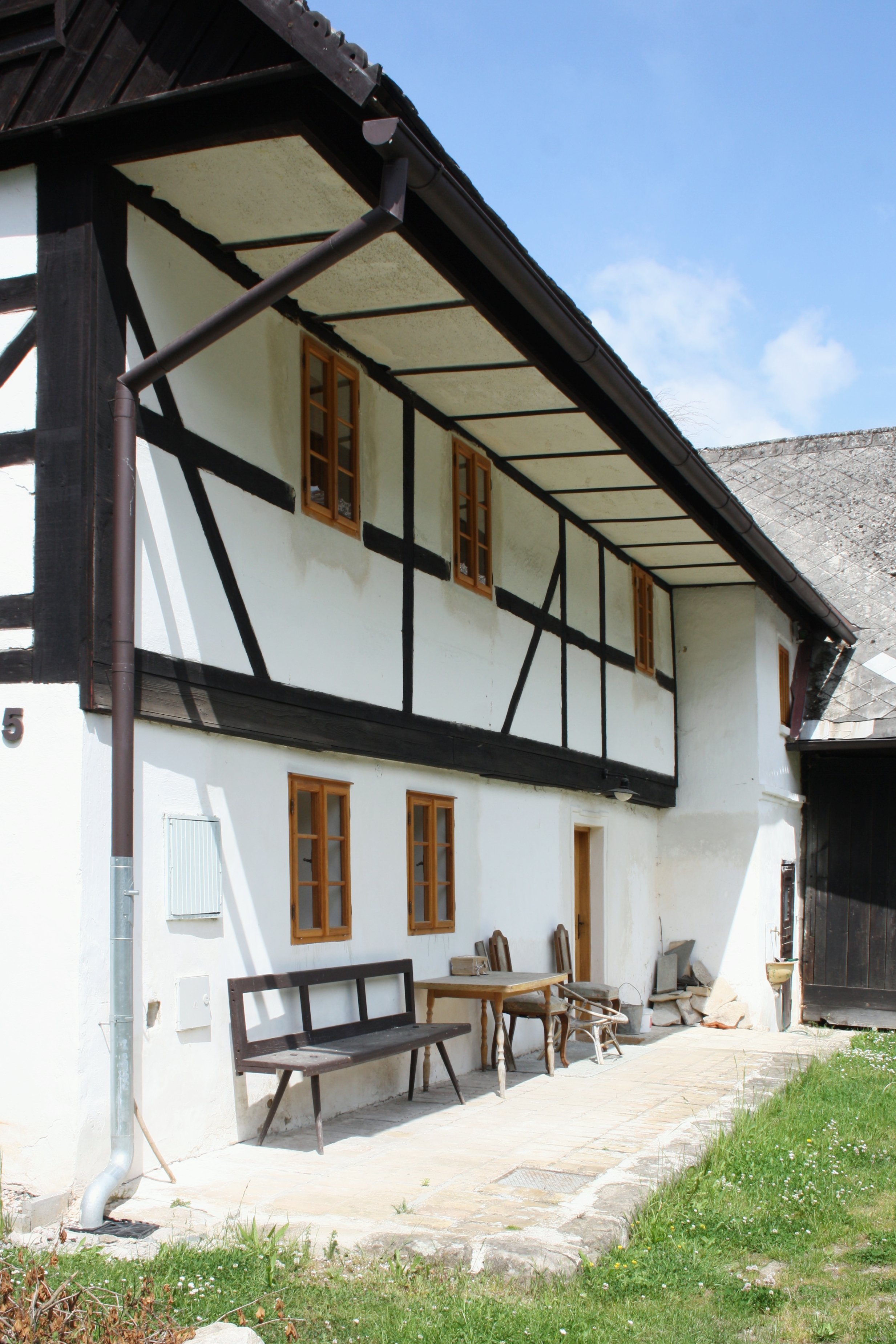 Obrok - zápraží lidového stavení s hrázděným patrem